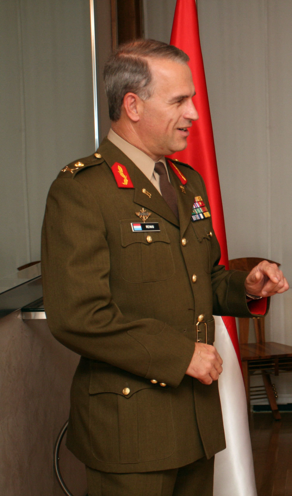 Generalmajor mag. Alojz Šteiner gosti luksemburškega kolega.